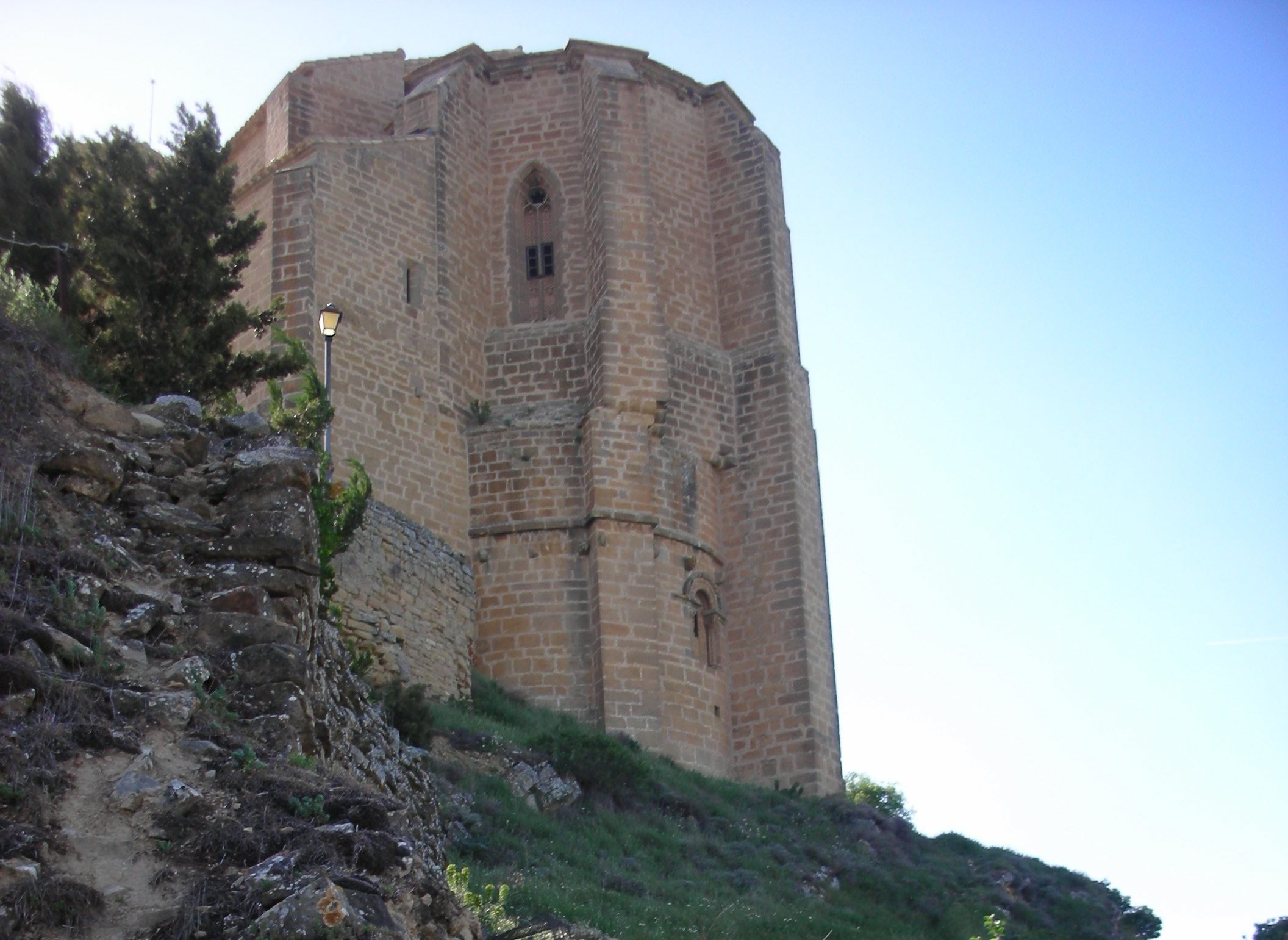 Abside de la iglesia de San Salvador, en Gallipienzo (Navarra)